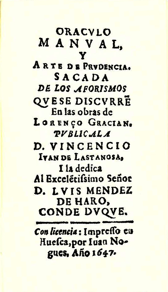 Página del título de Baltasar Gracián, Oráculo manual y arte de prudencia..., Huesca, Juan Nogués, 1647. Descripción analítica: ORACVLO/ MANVAL,/ Y/ ARTE DE PRVDENCIA./ SACADA/ DE LOS AFORISMOS/ QVE SE DISCVRREN/ En las obras de/ LORENÇO GRACIAN./ PVBLICALA/ D. VINCENCIO/ IVAN DE LASTANOSA,/ I la dedica/ Al Excelentissimo Señor/ D. LVIS MENDEZ/ DE HARO,/ CONDE DVQVE.// Con licencia: Impresso en/ Huesca, por Iuan No-/gues. Año 1647. Hojas en 24º, 209 ff. + 210r; 210vº con fe de erratas.